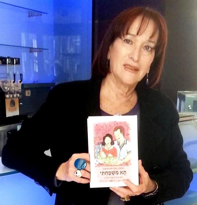 הסופרת ורדה גנזך